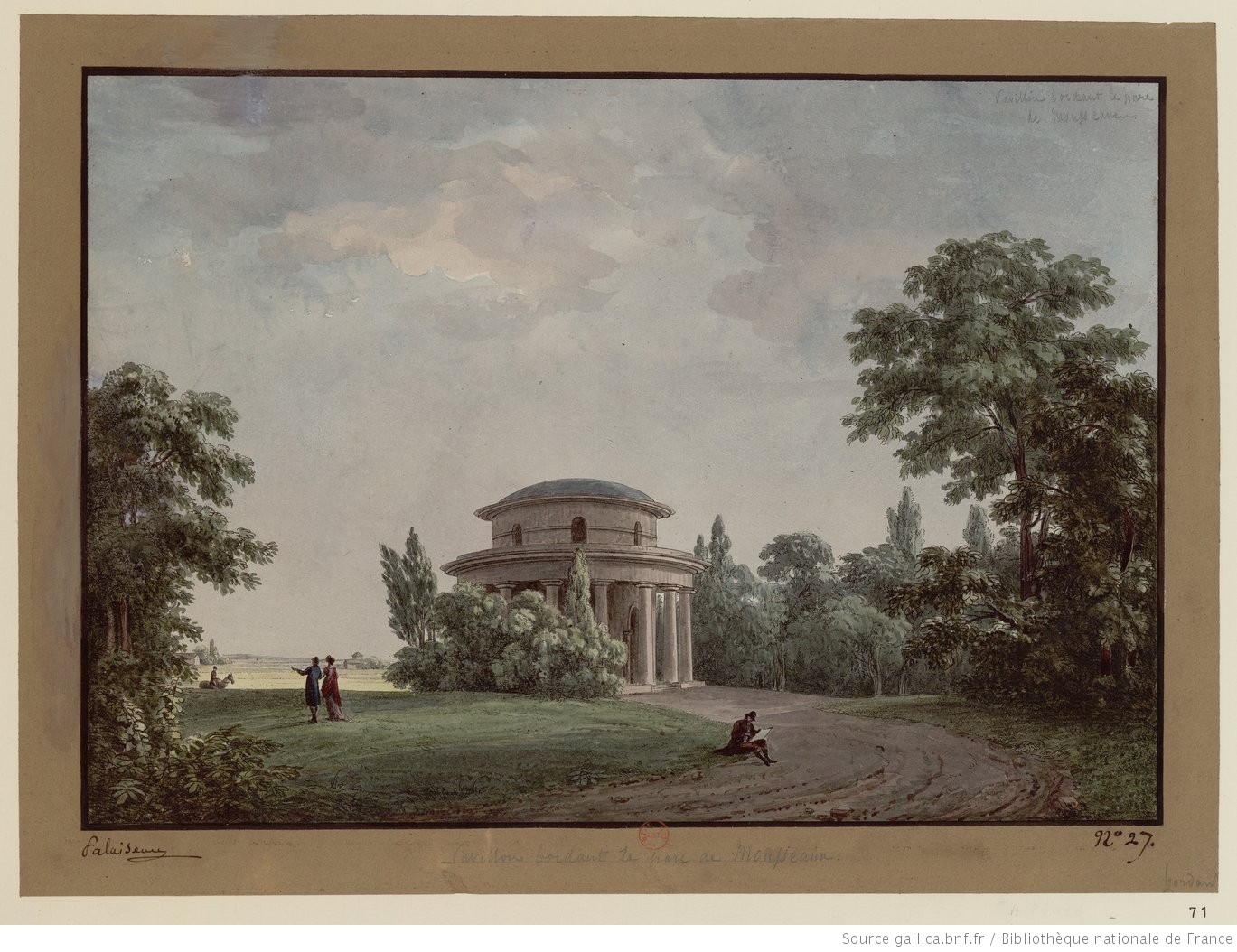 Pavillon Monceau